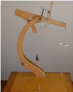 Maqueta del goniobarímetro para uso práctico o didáctico. Funciona como báscula para pesos entre 0 y 90 gramos con precisión de 1 gramo o entre 0 y 9 gramos con precisión de 1 decigramo